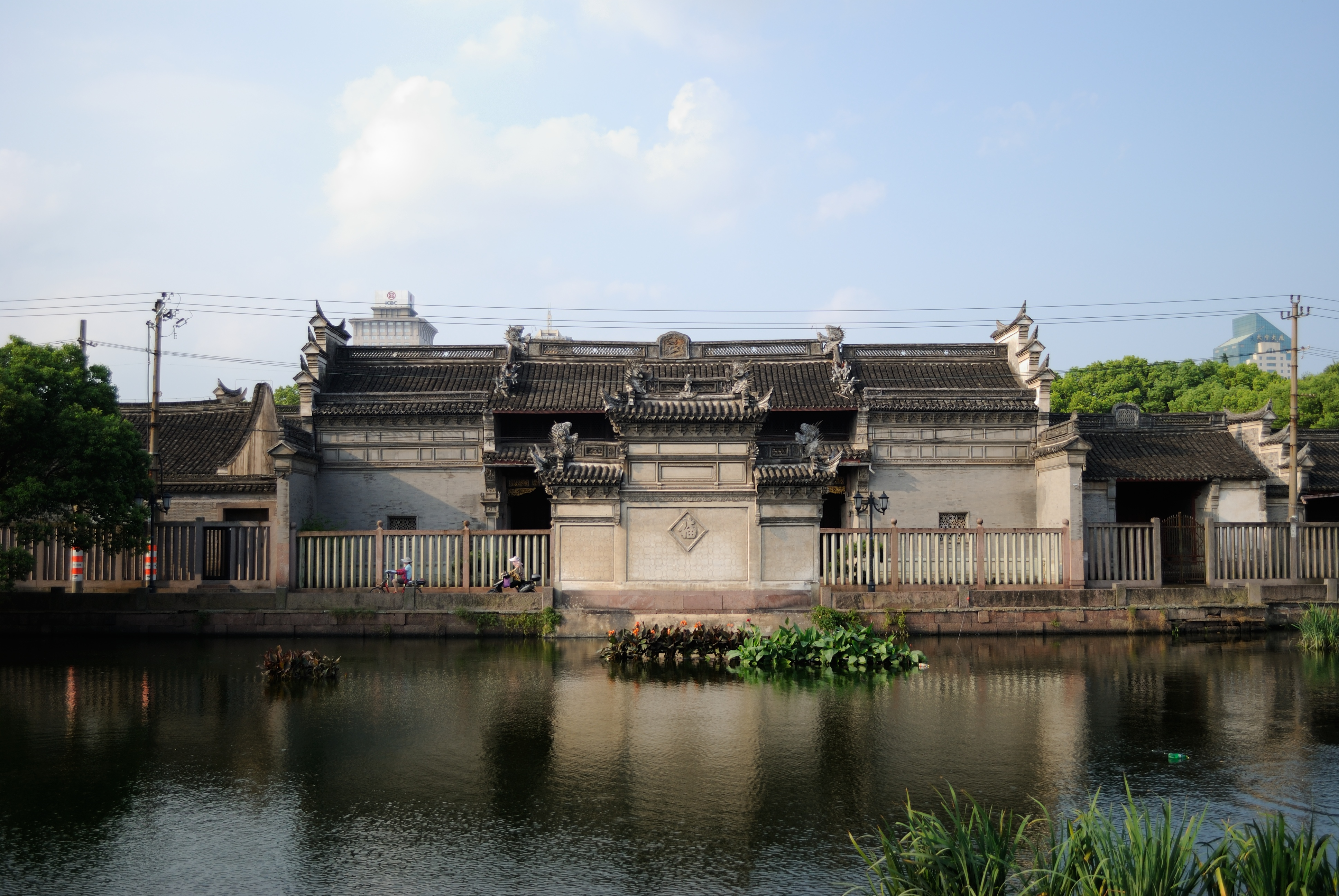 秦氏支祠南门，现为天一阁博物馆出口